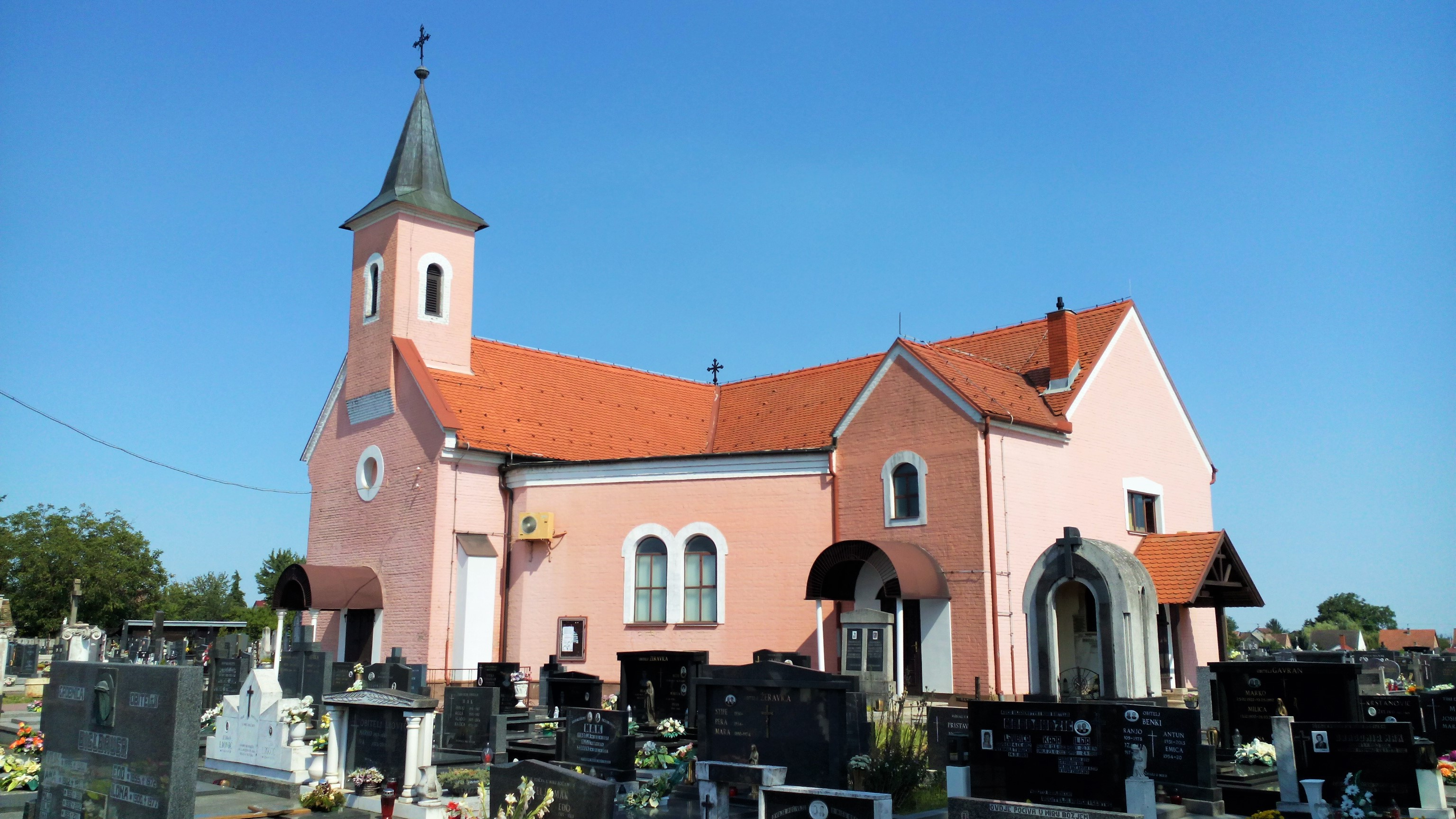 Crkva Uskrsnuća Kristova u Čepinu.